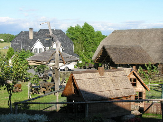 Padvariai, Kretingos raj.. Kaimo turizmo sodyba. Foto: Algirdas, 2006 m. birželio 29 d., lietuva